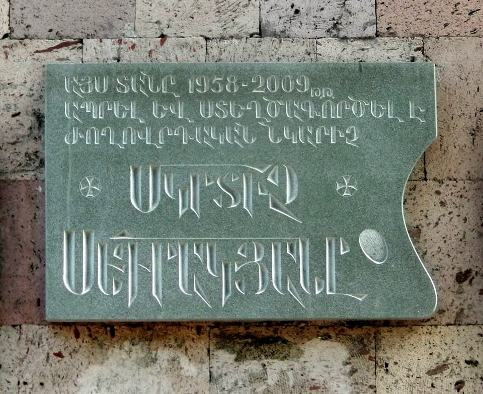 Մկրտիչ Սեդրակյանի հուշատախտակը Երևանի Կիևյան 24 հասցեում